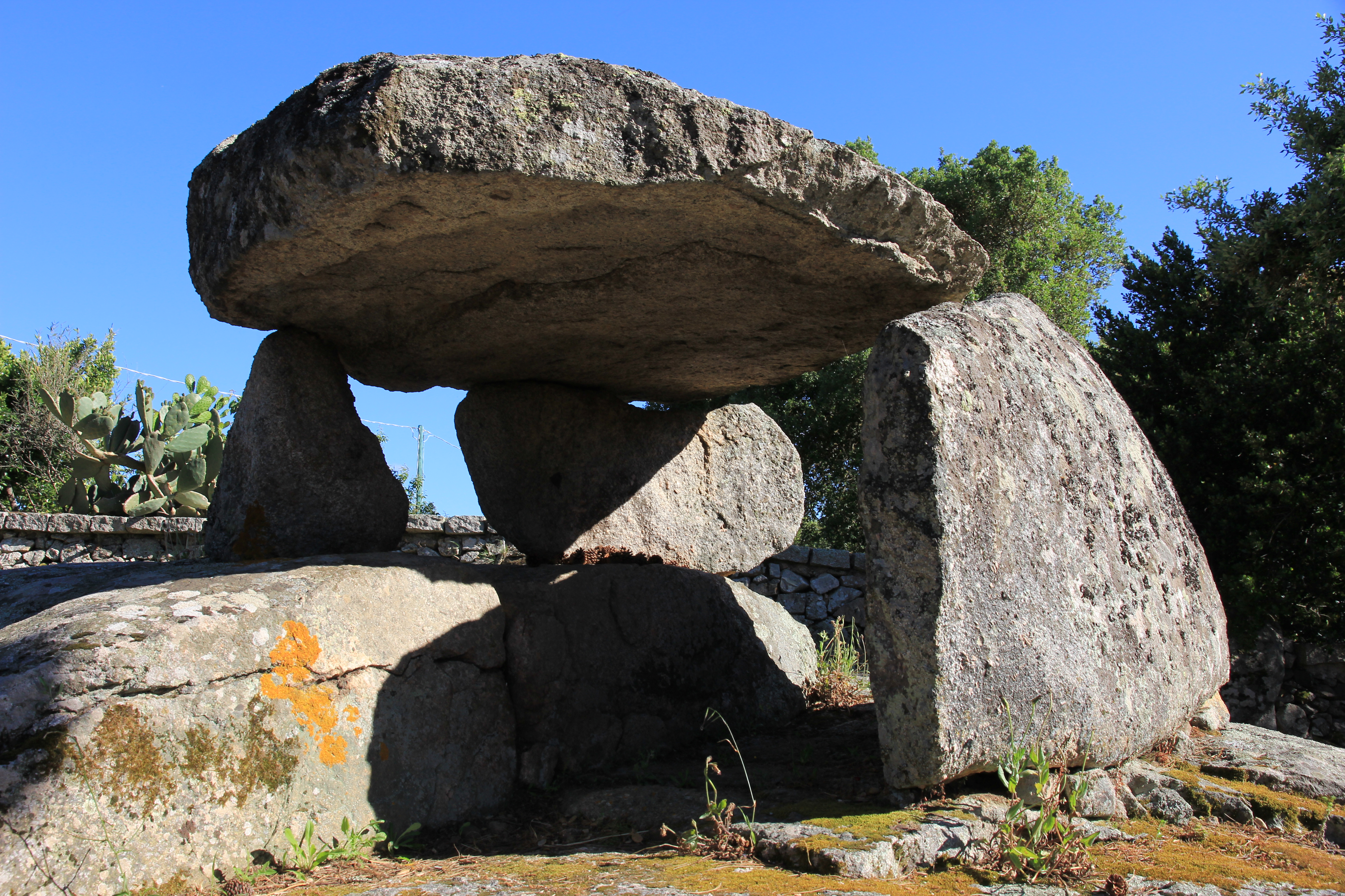 Luras - Dolmen di Billella